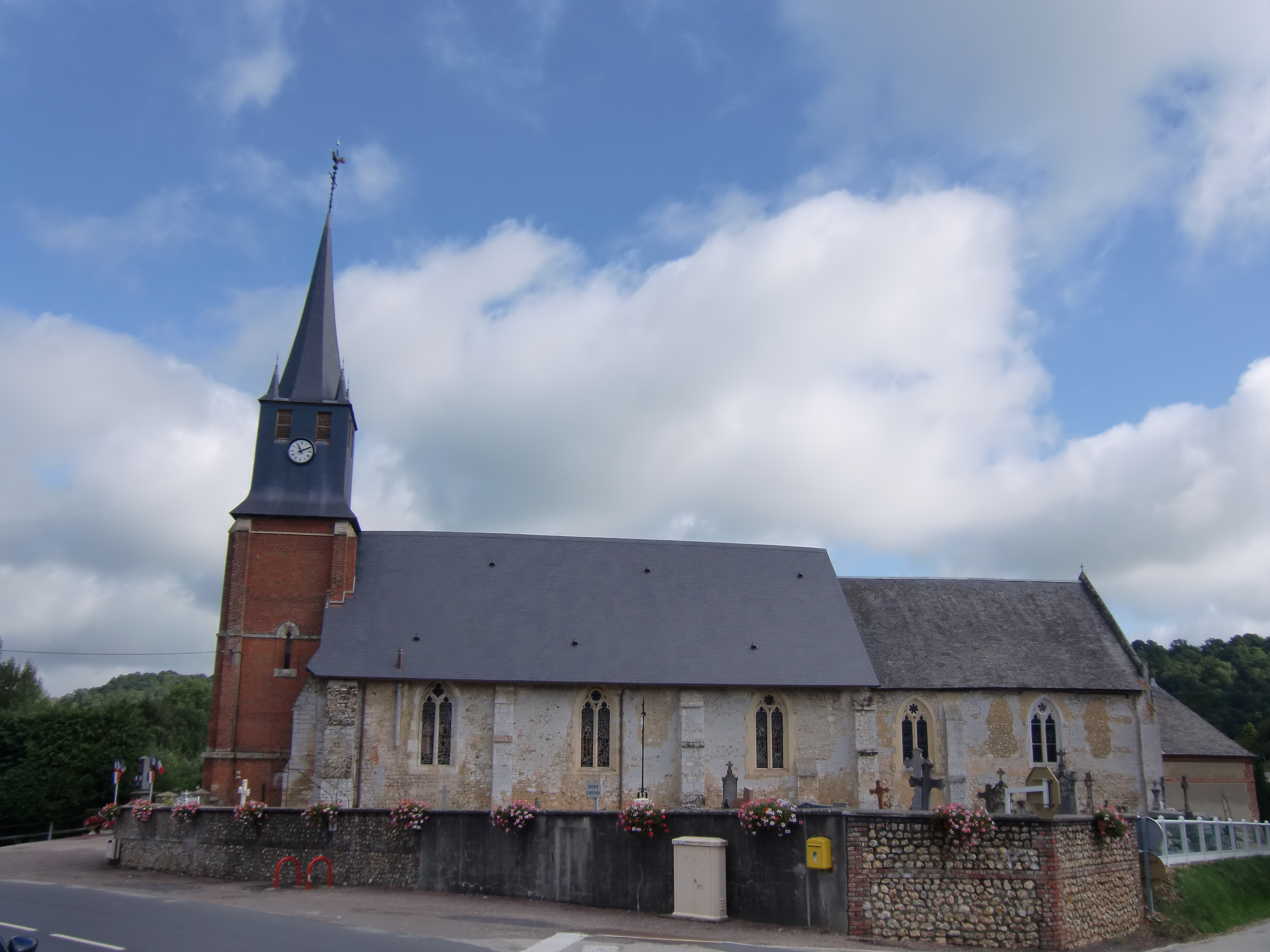 église de Saint-Pierre-de-Cormeilles (Eure, Normandie, France)